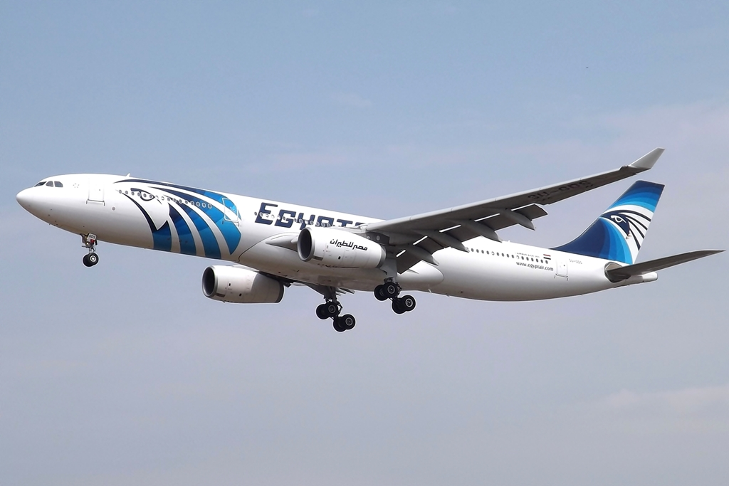 SU-GDS A330 Egyptair